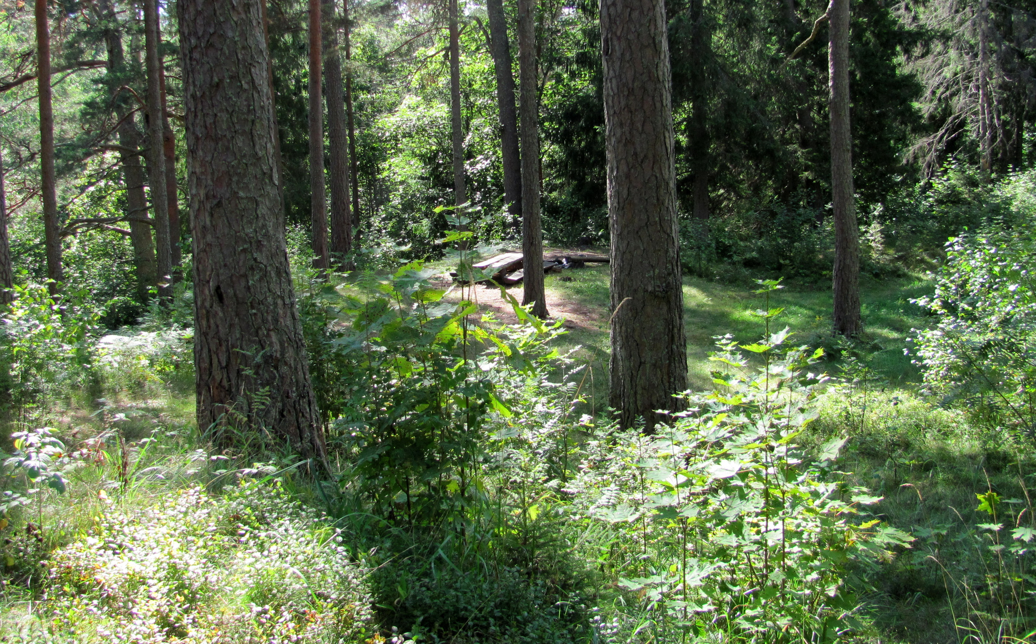 Vaade linnusevallilt kunagisele õuele.